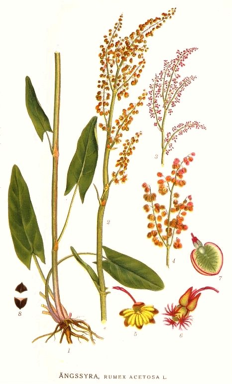 Original Description Ängssyra, Rumex acetosa L.